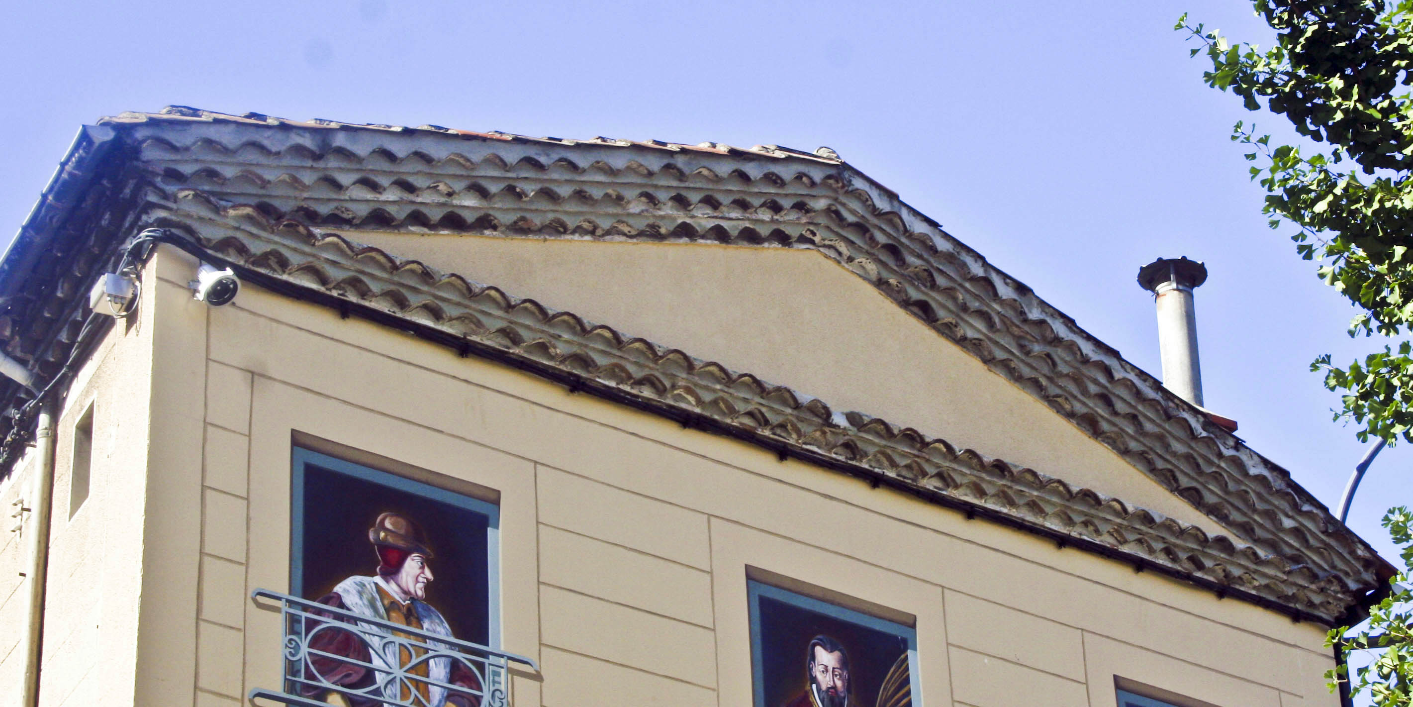 Génoise à trois rangs sous toiture et prolongement horizontal sur pignon, formant fronton, Valence, Drôme, France.